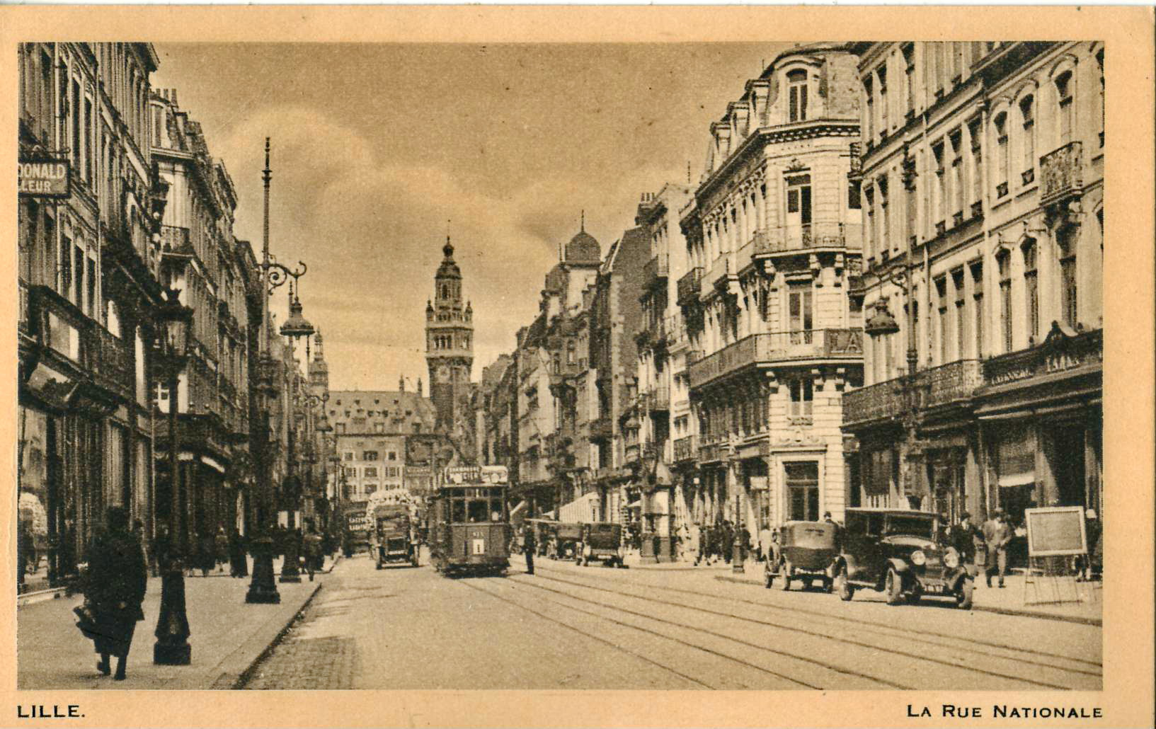 Carte postale ancienne, sans mention d'éditeur :LILLE - La Rue Nationale